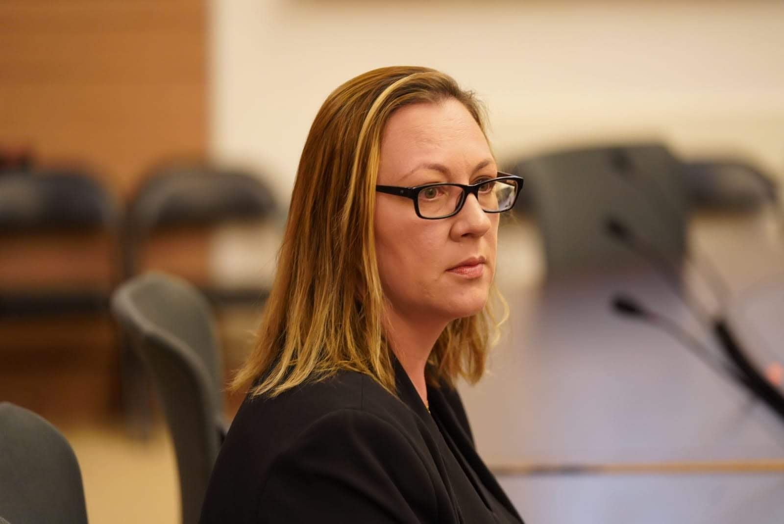 יוליה מלינובסקי